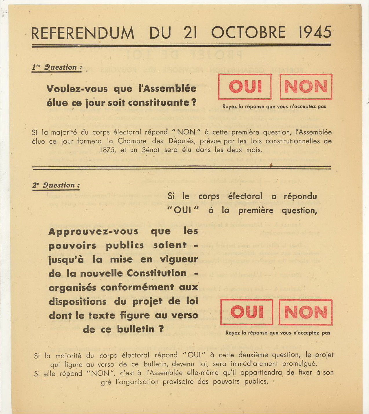 Programme du référendum du 21 octobre 1945 sur la loi constitutionnelle de 1945 - recto.